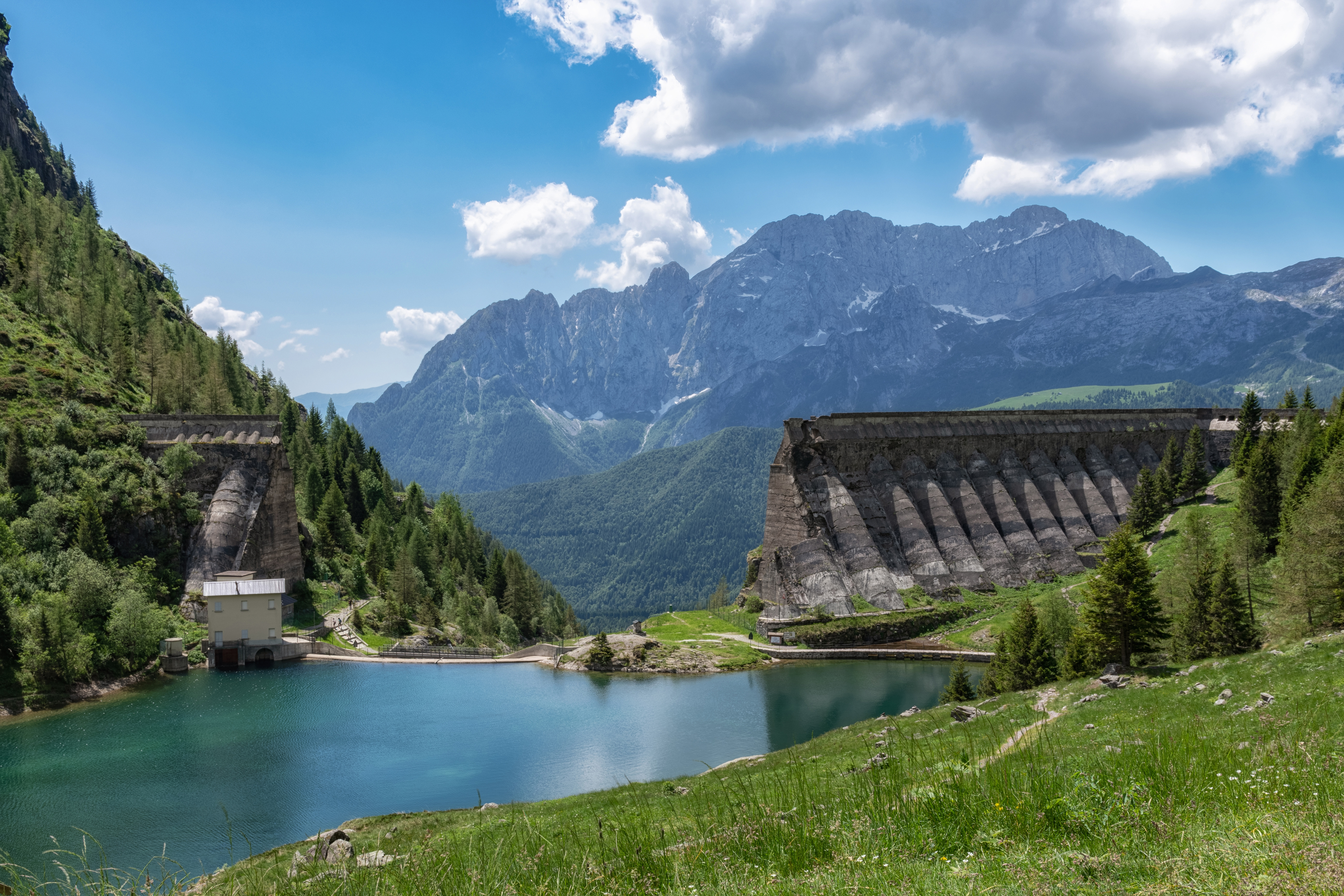 Alta Val di Scalve (Q47483993)